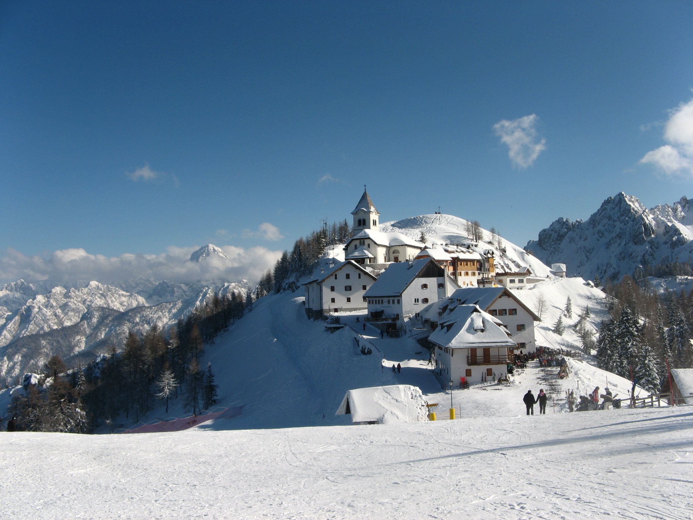 Това са хотелите по пистите тук. Красиво нали?